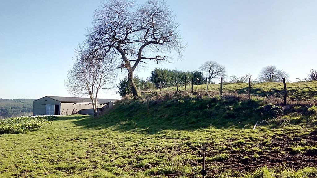 Vista da croa do castro de Vizoño, cara norte.